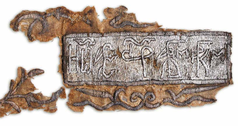 Остатак тканине рађене у златовезу